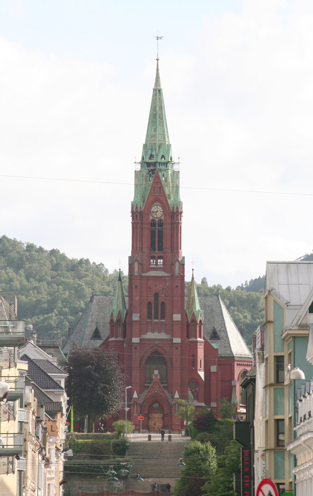 Johanneskirken (church of st. John) in Bergen.